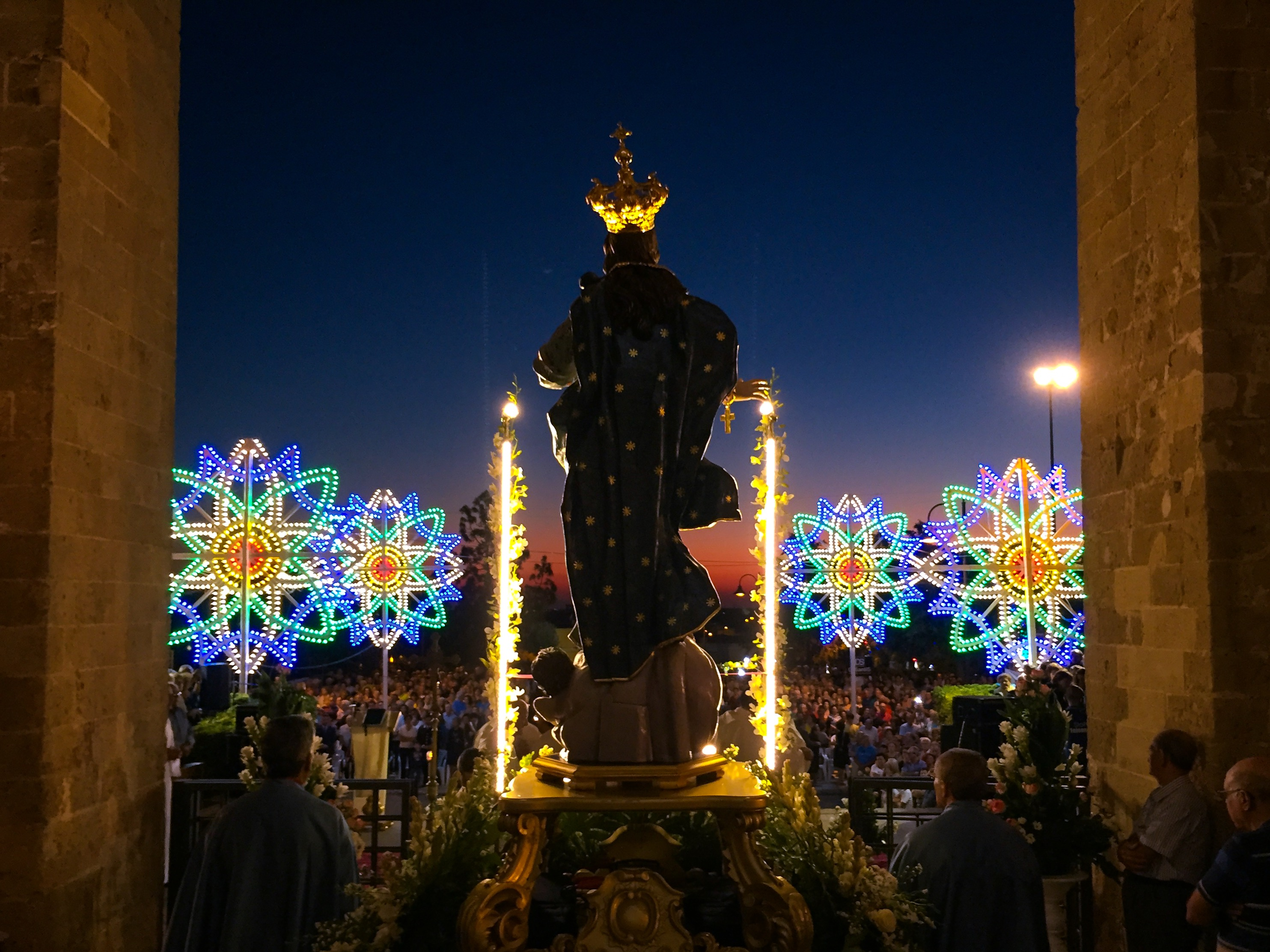 Processione della Lizza ad Alezio